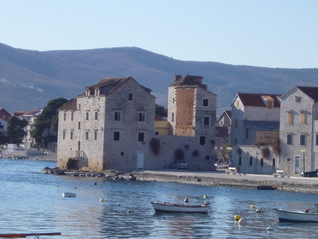 Kaštel Štefileo u Kaštel Štafiliću